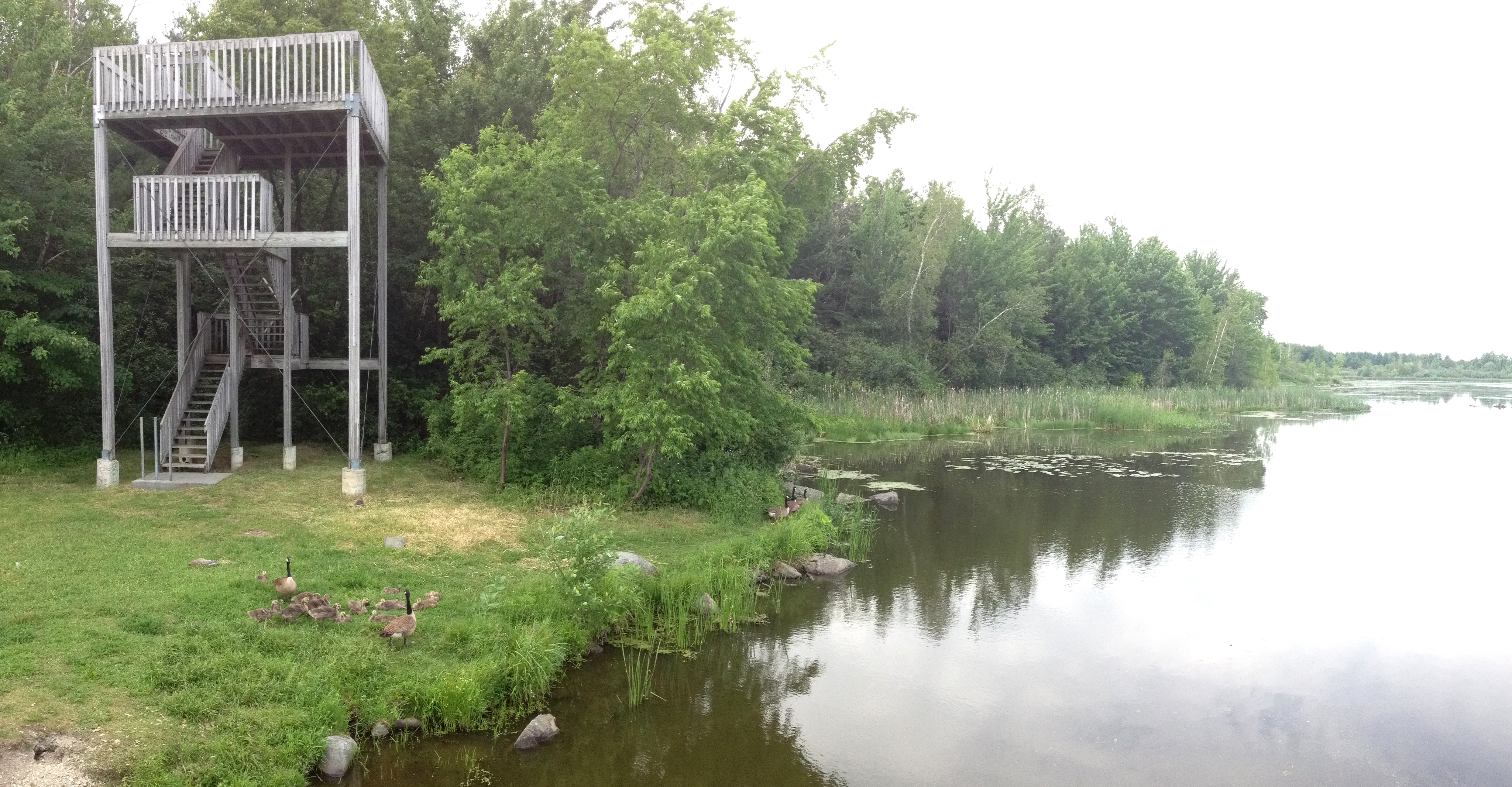 Poste d'observation de la nature aux abords de la Yamaska à Granby. Lac Boivin.